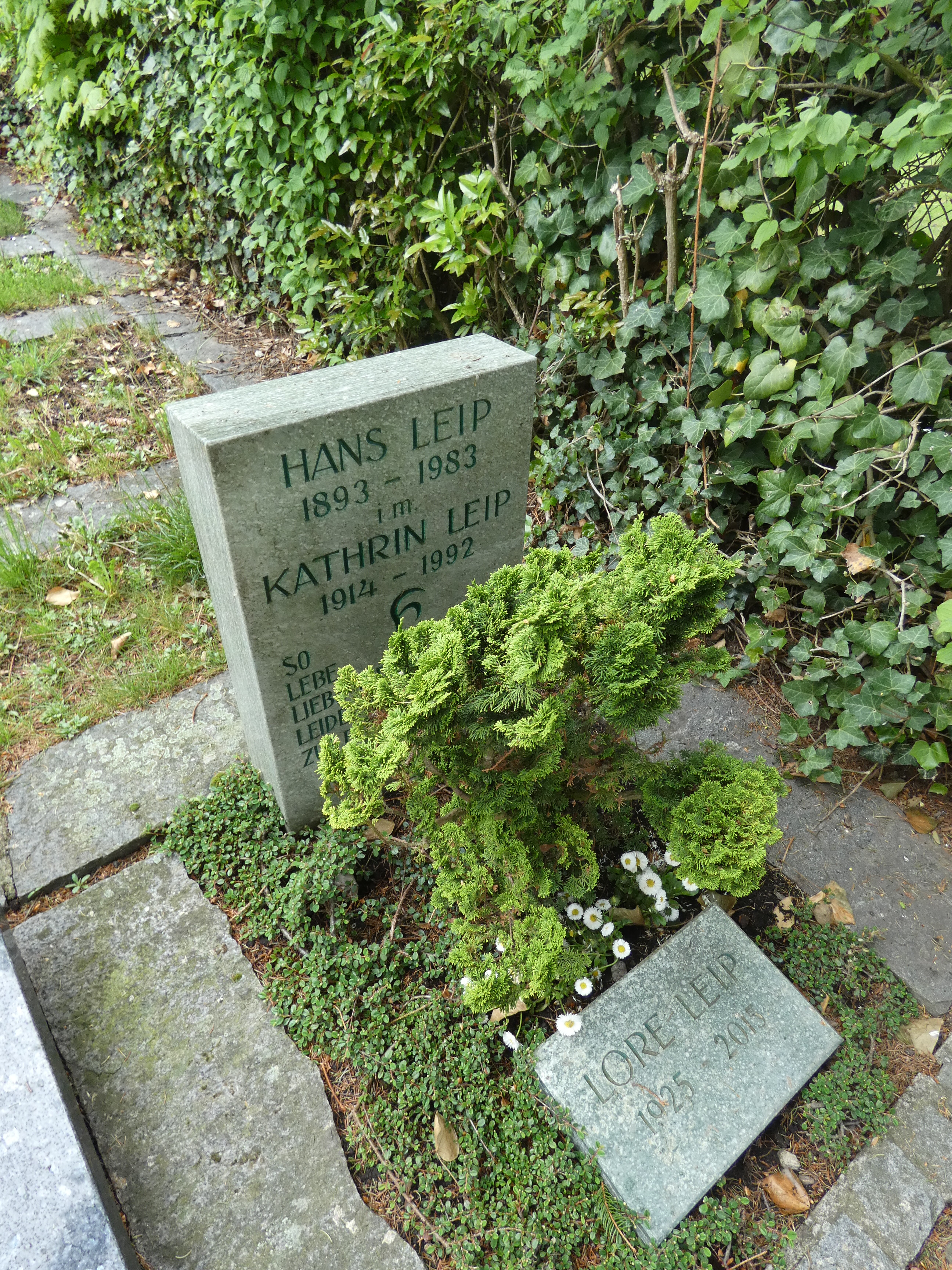 Grab von Hans Leip auf dem Friedhof Horn (Gaienhofen)